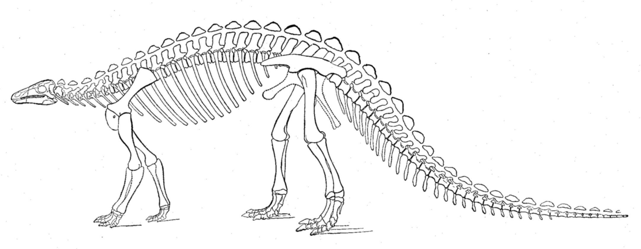 Scelidosaurus harrisonii skeleton.